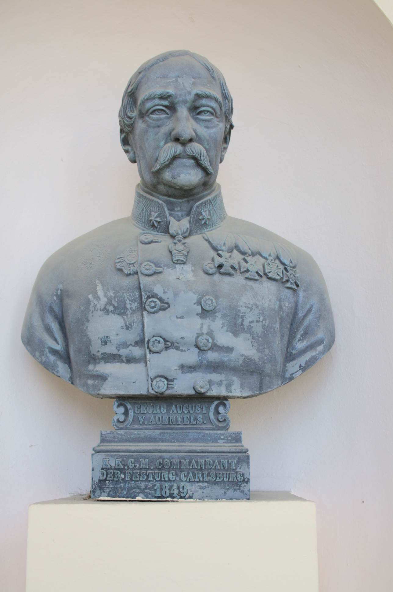 Büste in der Gedenkstätte Heldenberg (Niederösterreich)